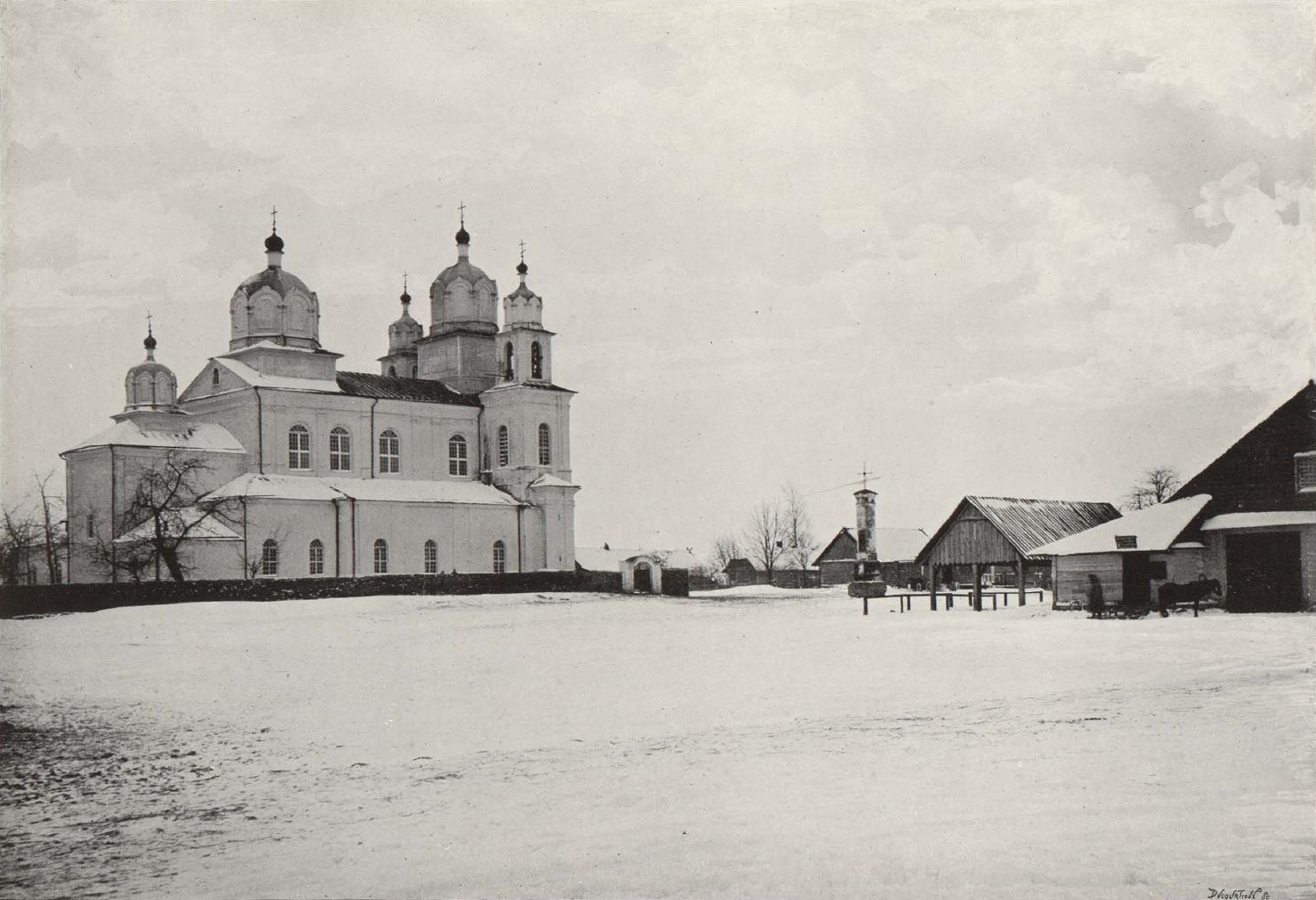 Беларуская (тарашкевіца): Сталавічы (Stałavičy), пляц Рынак (plac Rynak). Касьцёл Сьвятога Яна Хрысьціцеля па маскоўскай перабудове